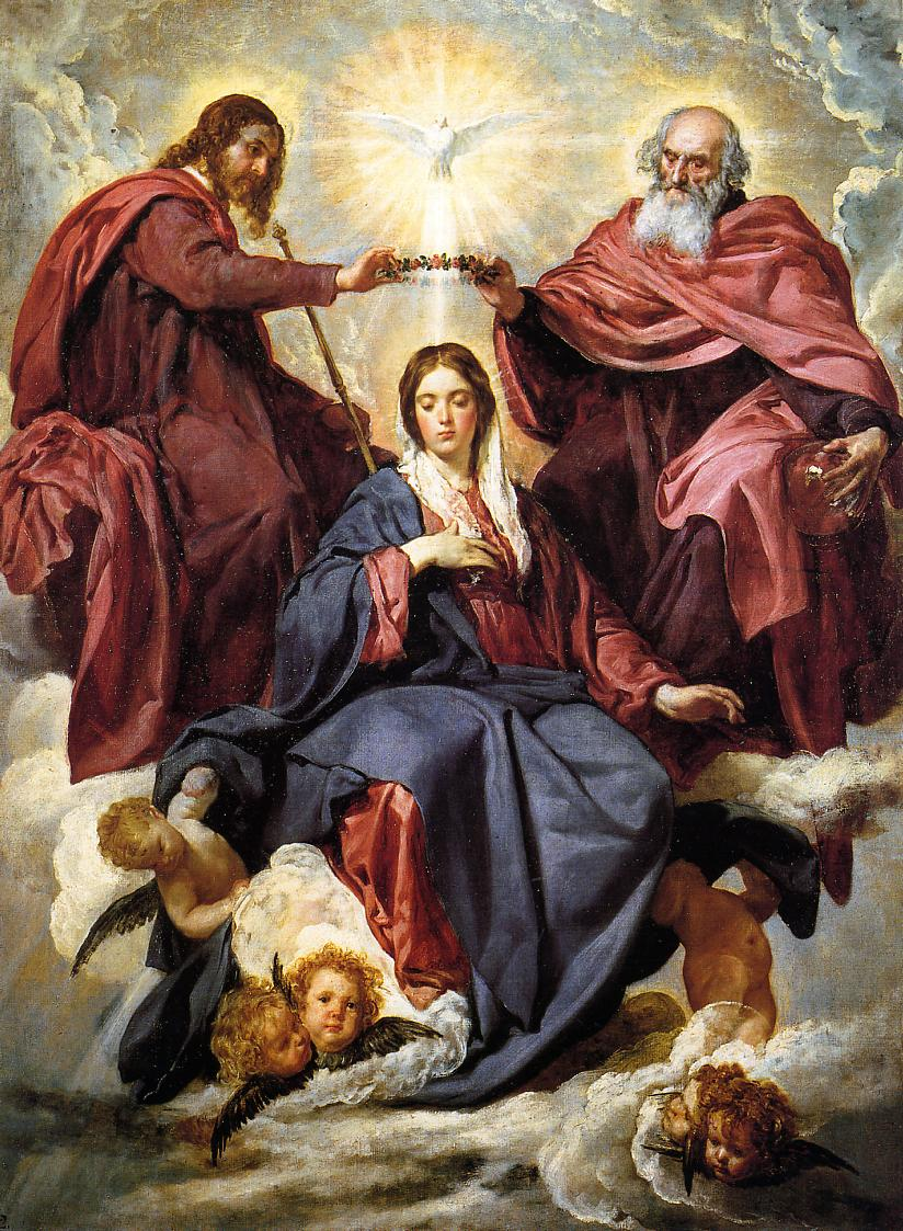 La obra representa la coronación de la Virgen María, madre de Jesucristo, por los tres miembros de la Santísima Trinidad.